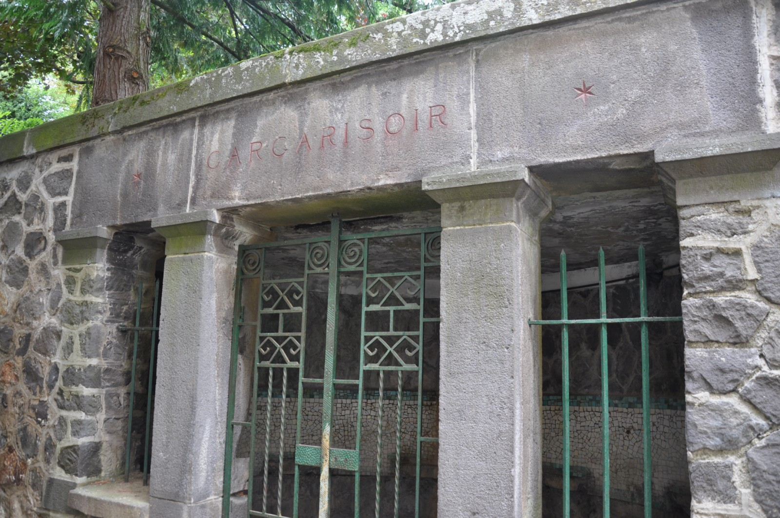 Gargarisoir